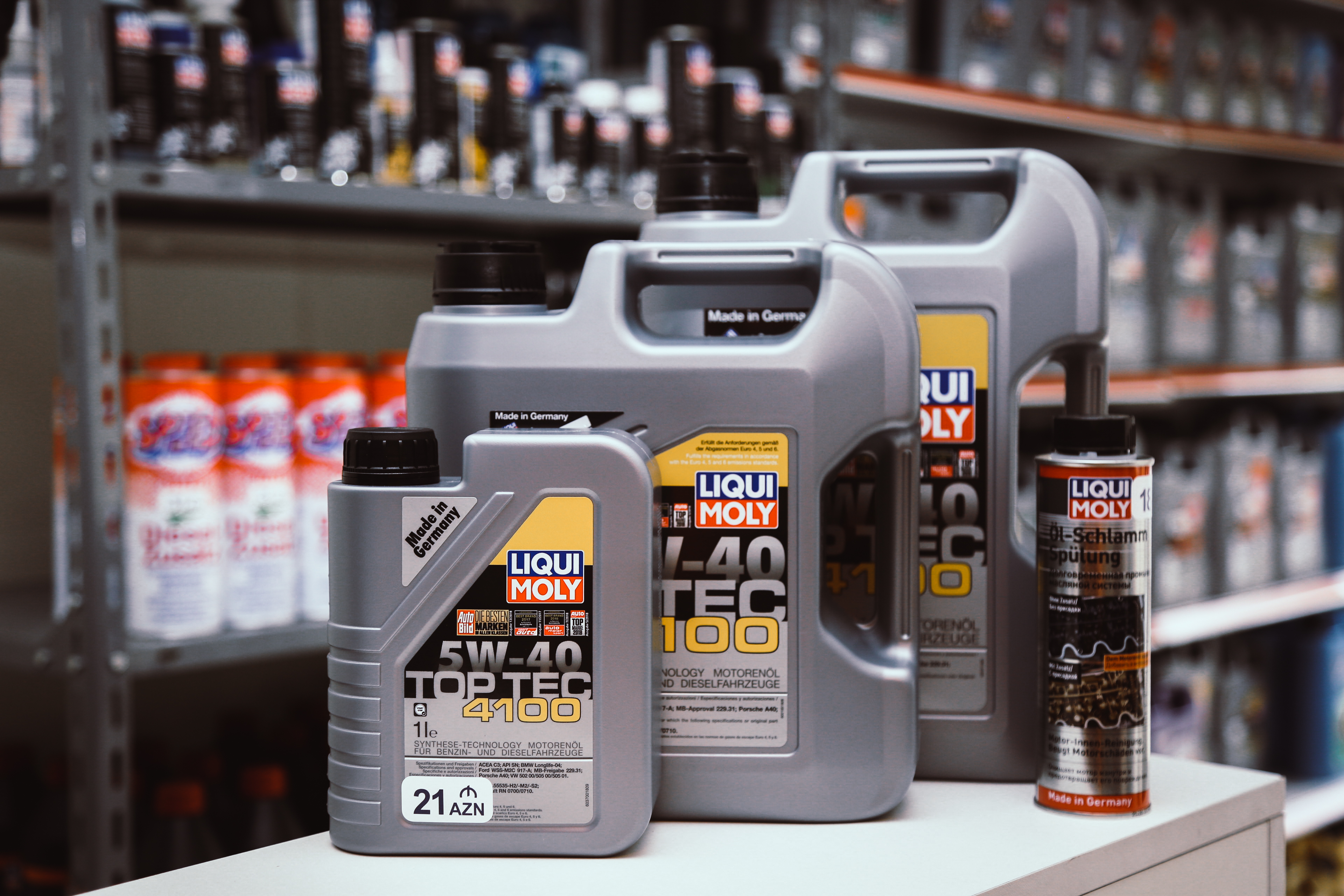 Top Tec 4100